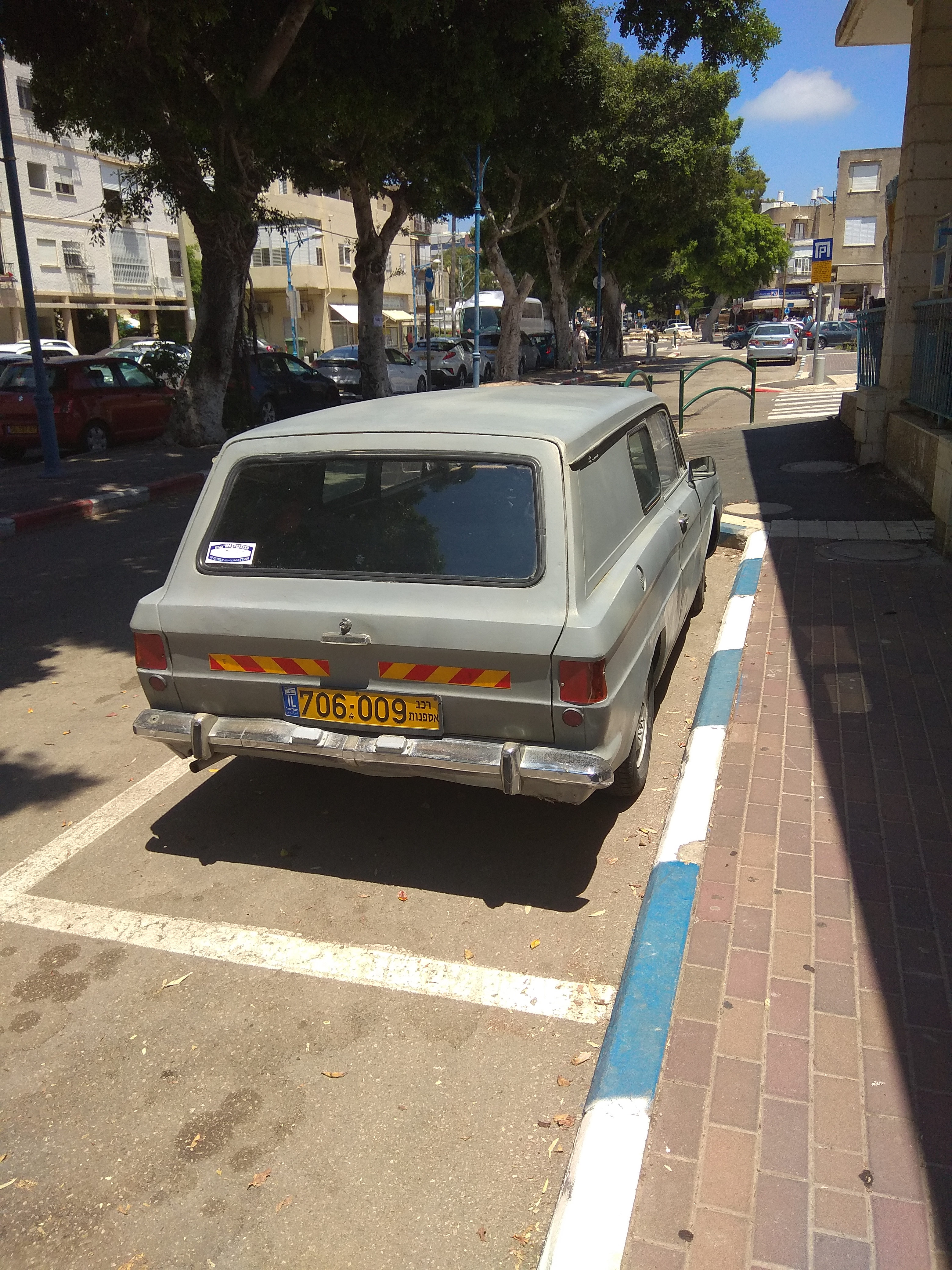 רכב אספנות בחיפה